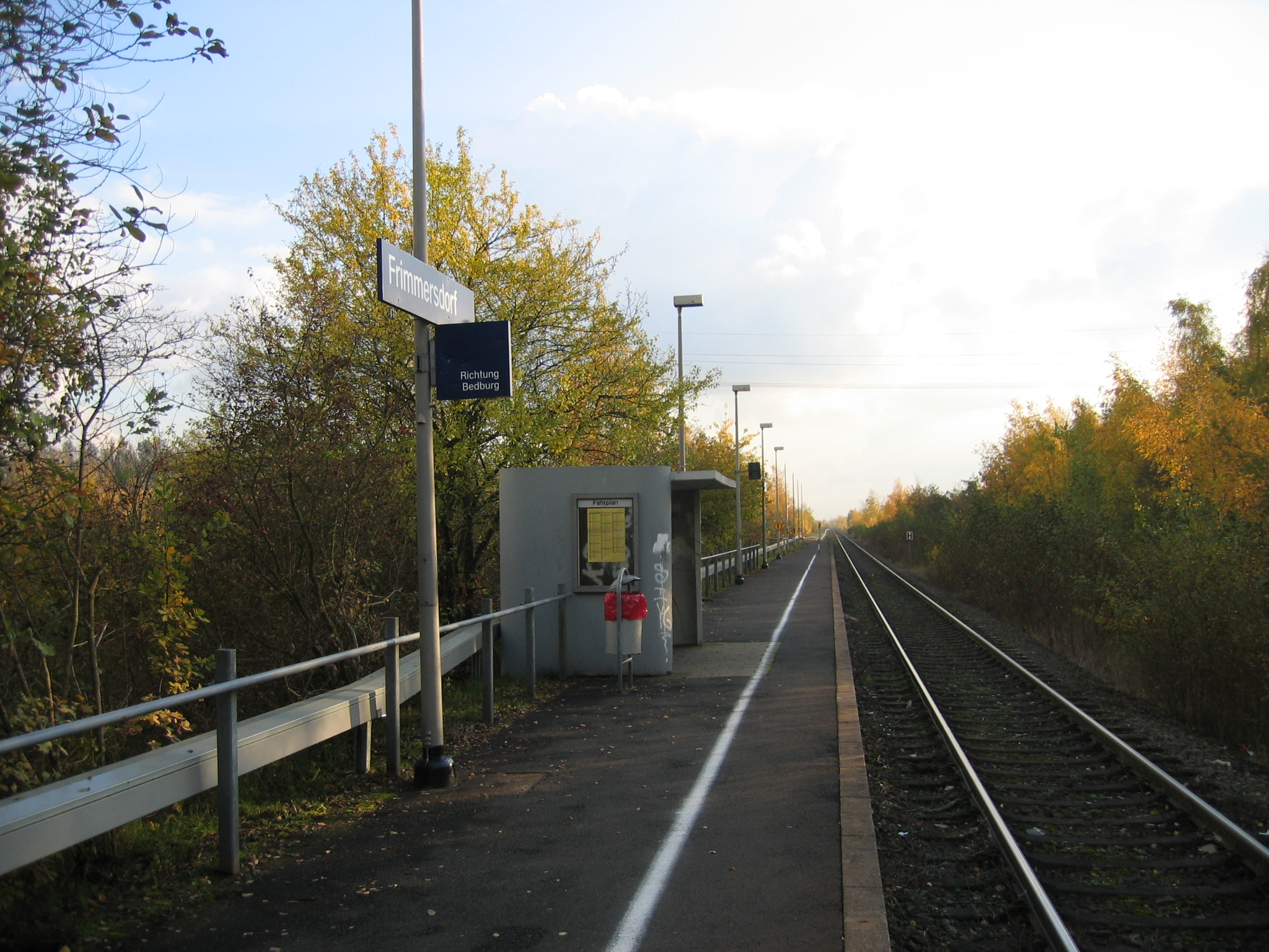 Haltepunkt Frimmersdorf an der Erftstrecke.